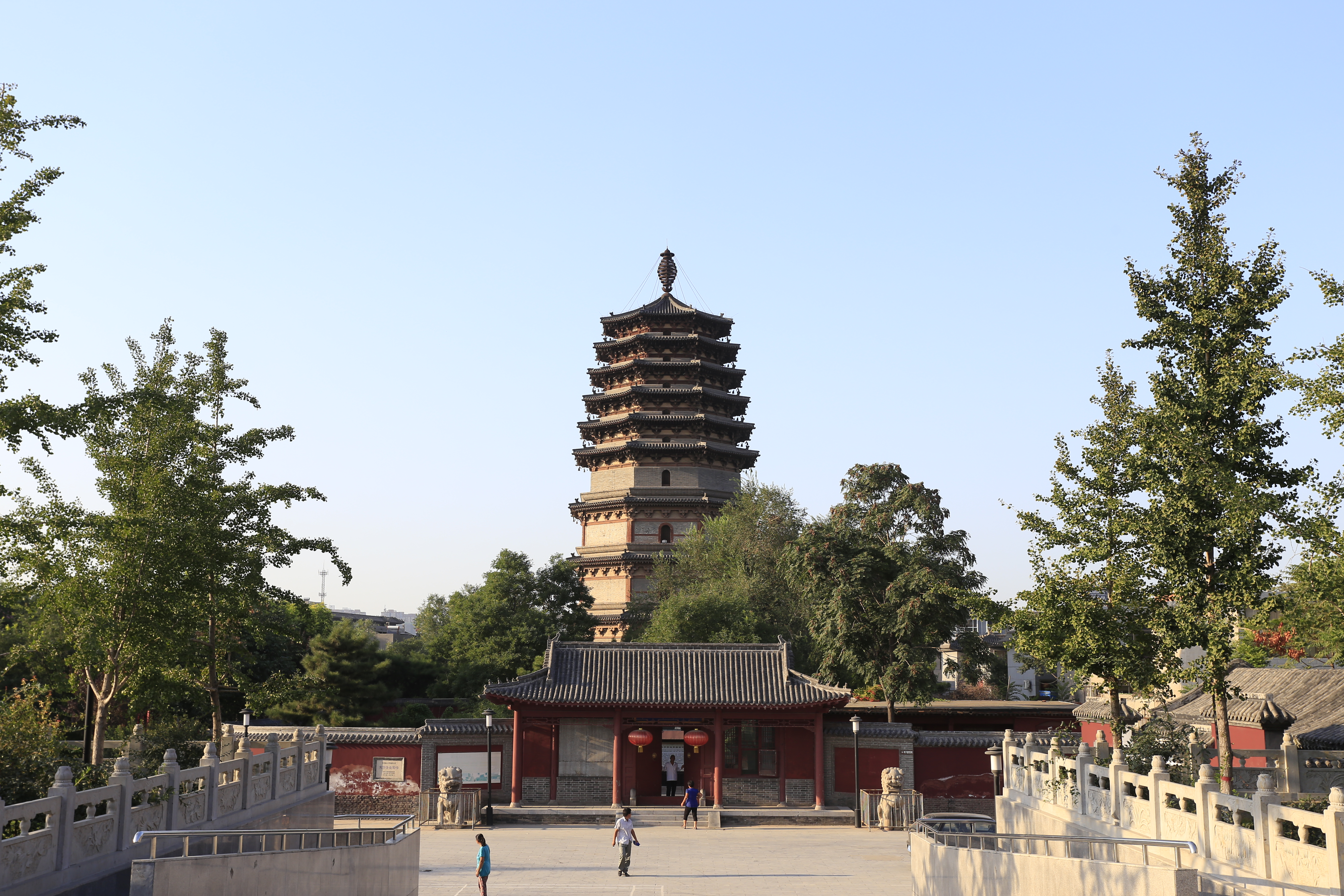 正定天宁寺凌霄塔